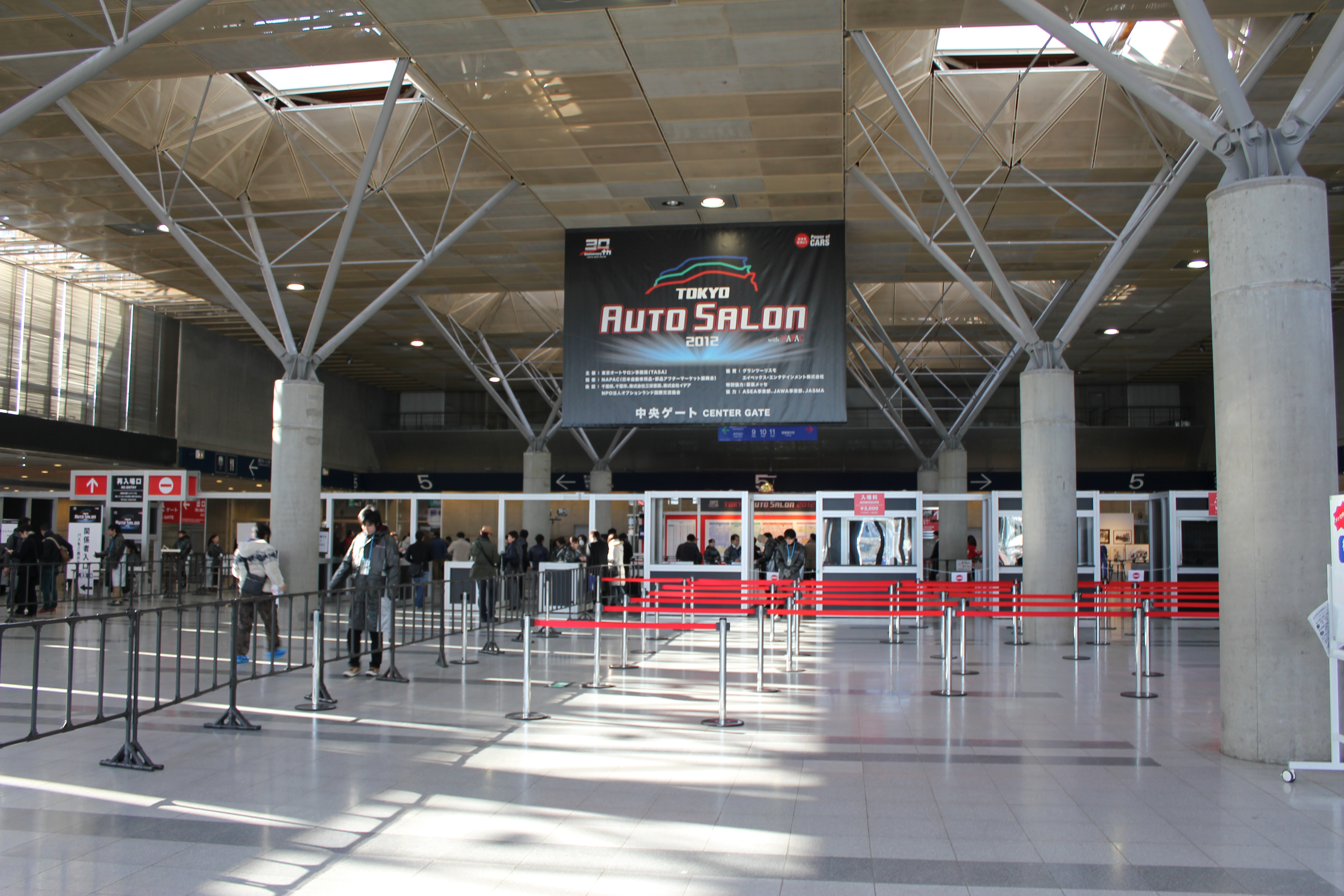 東京オートサロン